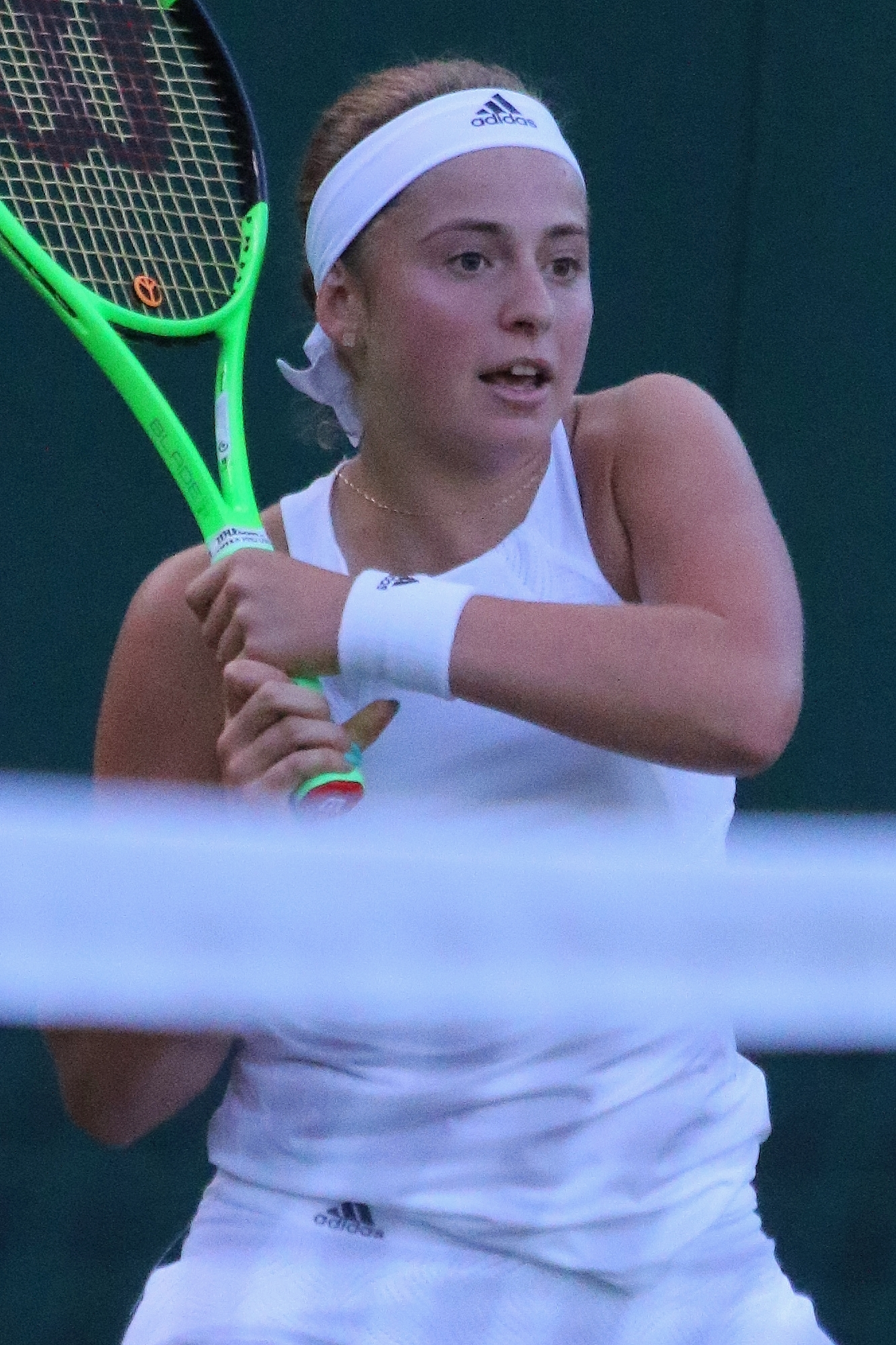 Ostapenko WM17 (7)